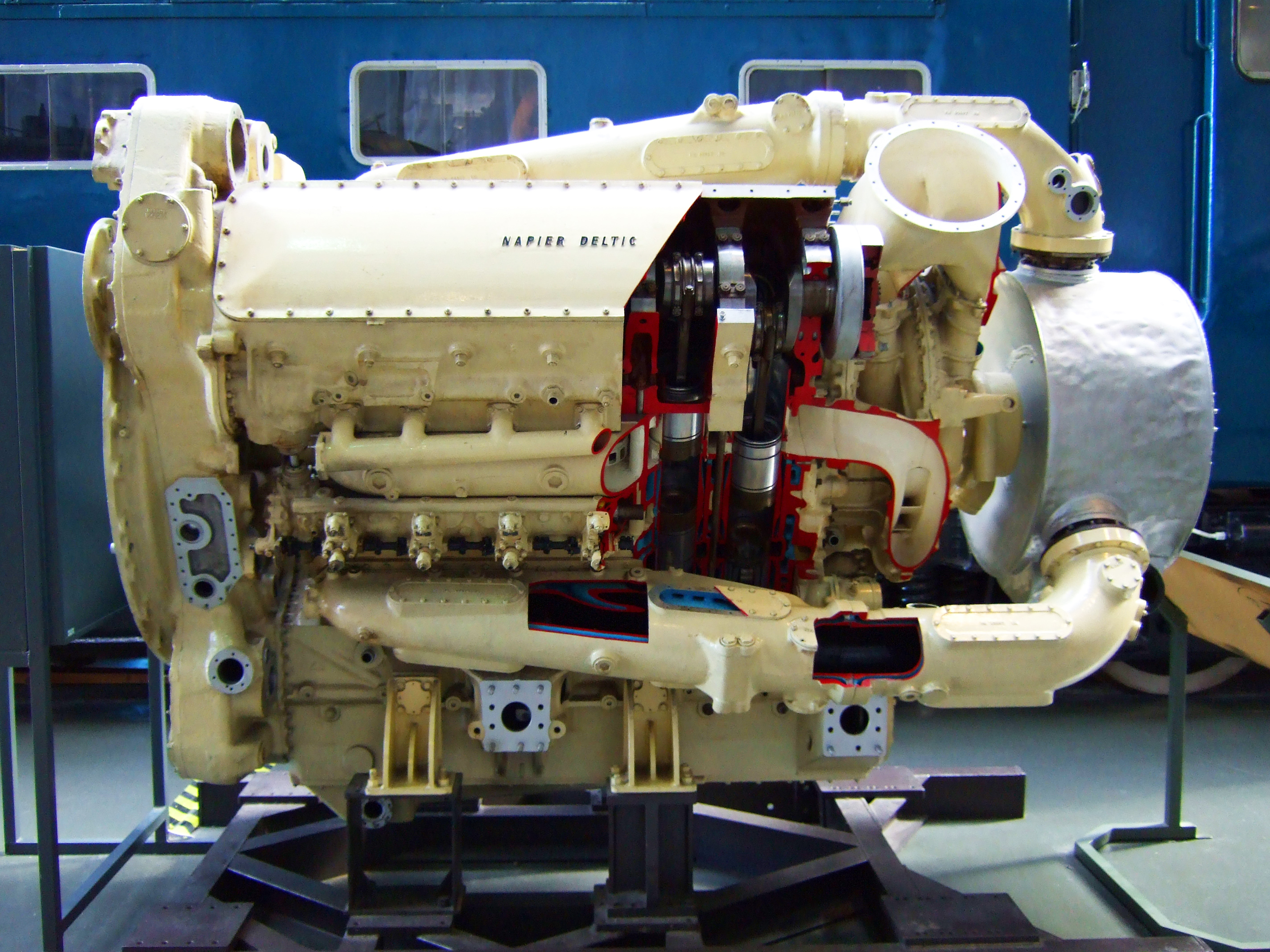 Napier Deltic Diesel Engine